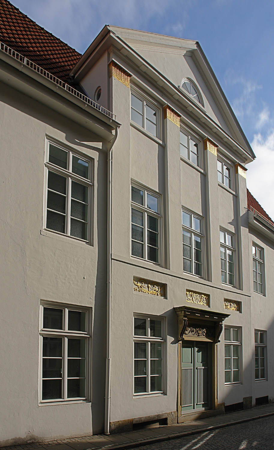 Bremen: Haus Vorwärts (Sandstraße 4), Fassade um 1819